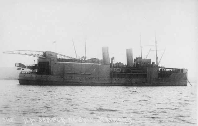 HMS Nairana during 1918